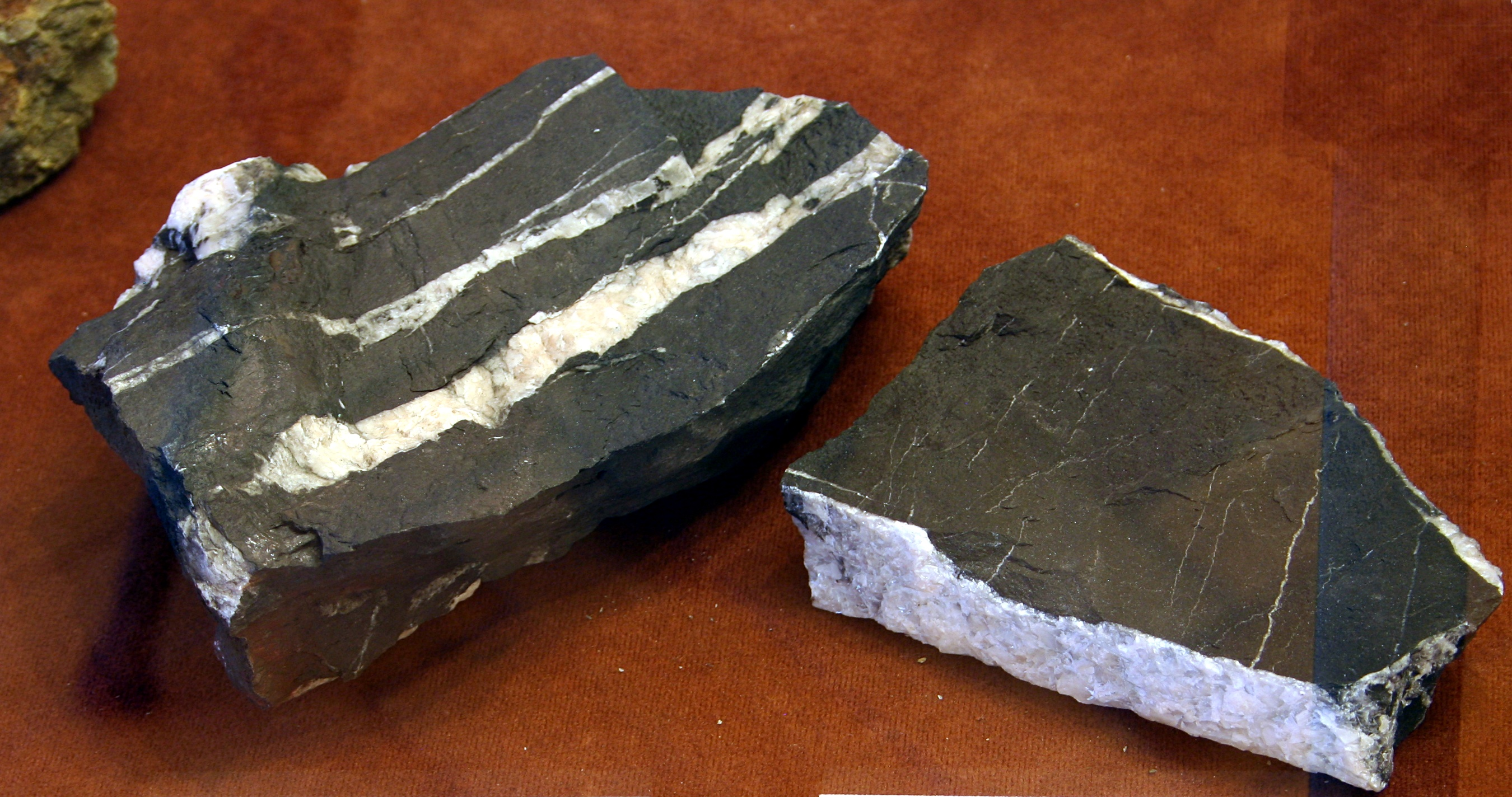 Muzeum Złota w Złotoryi. Łupki grafitowe ilasto-krzemionkowe z miejscowości Vapenný Dúl w Czechach